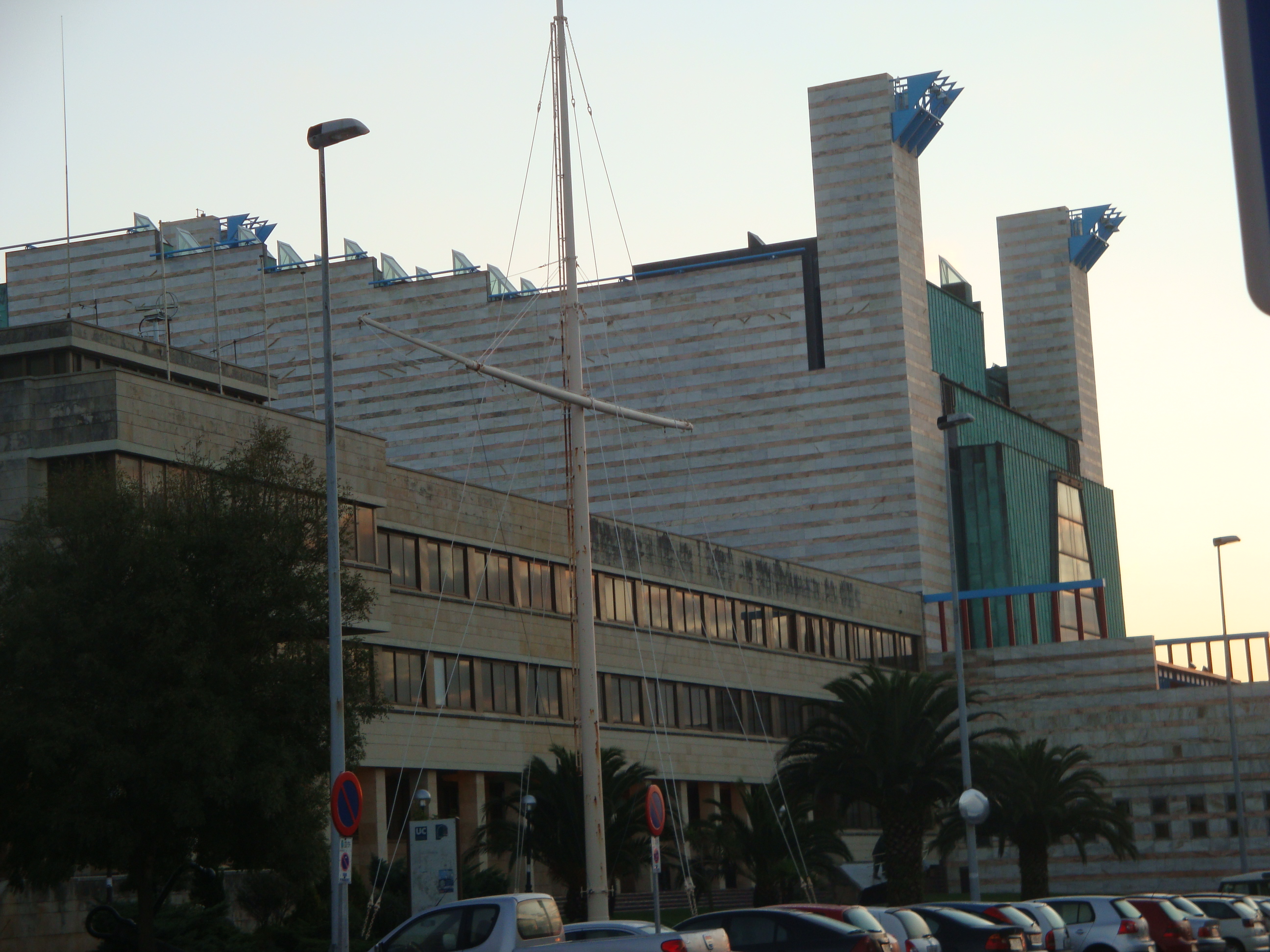 En primer término la Escuela Superior de la Marina Civil y, al fondo, el Palacio de Festivales de Cantabria